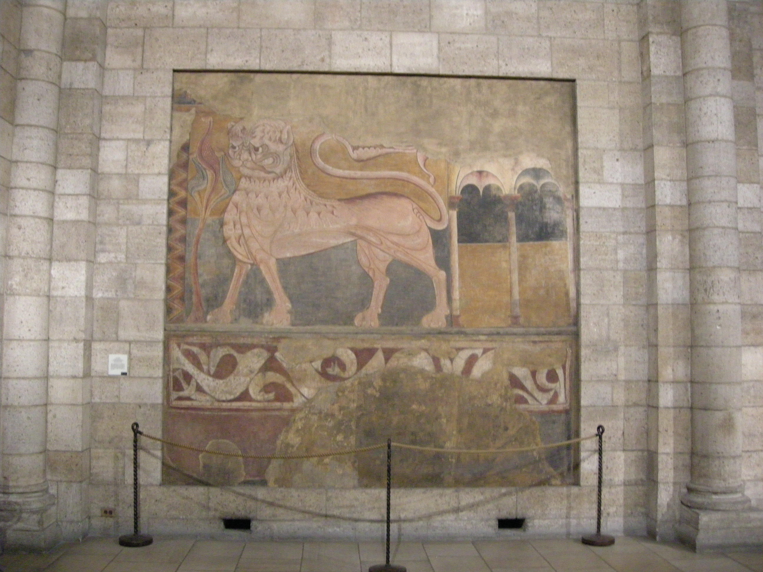 Lion passant, burgos, post 1300